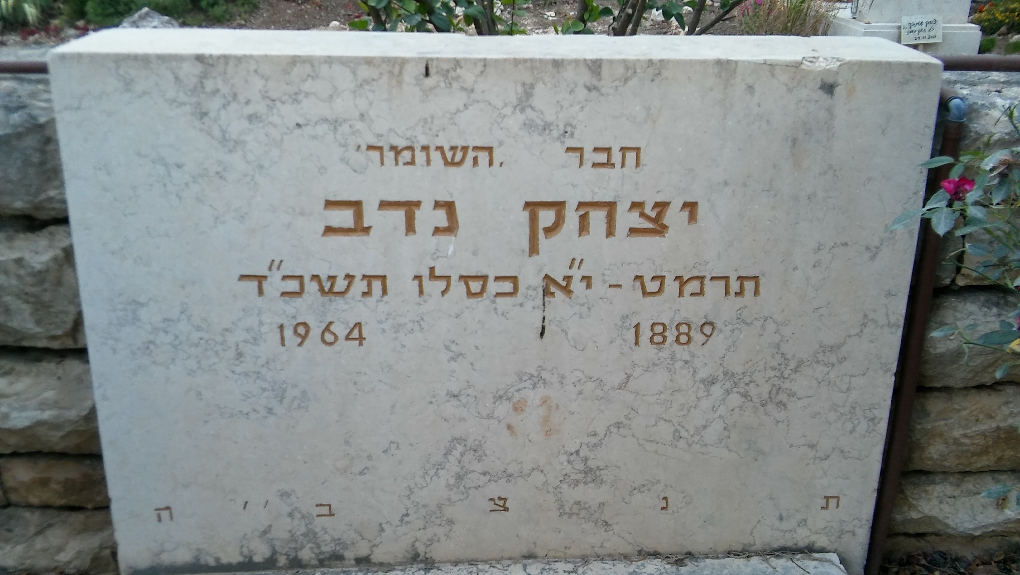 קברו של יצחק נדב בחלקת השומר בבית הקברות של כפר גלעדי